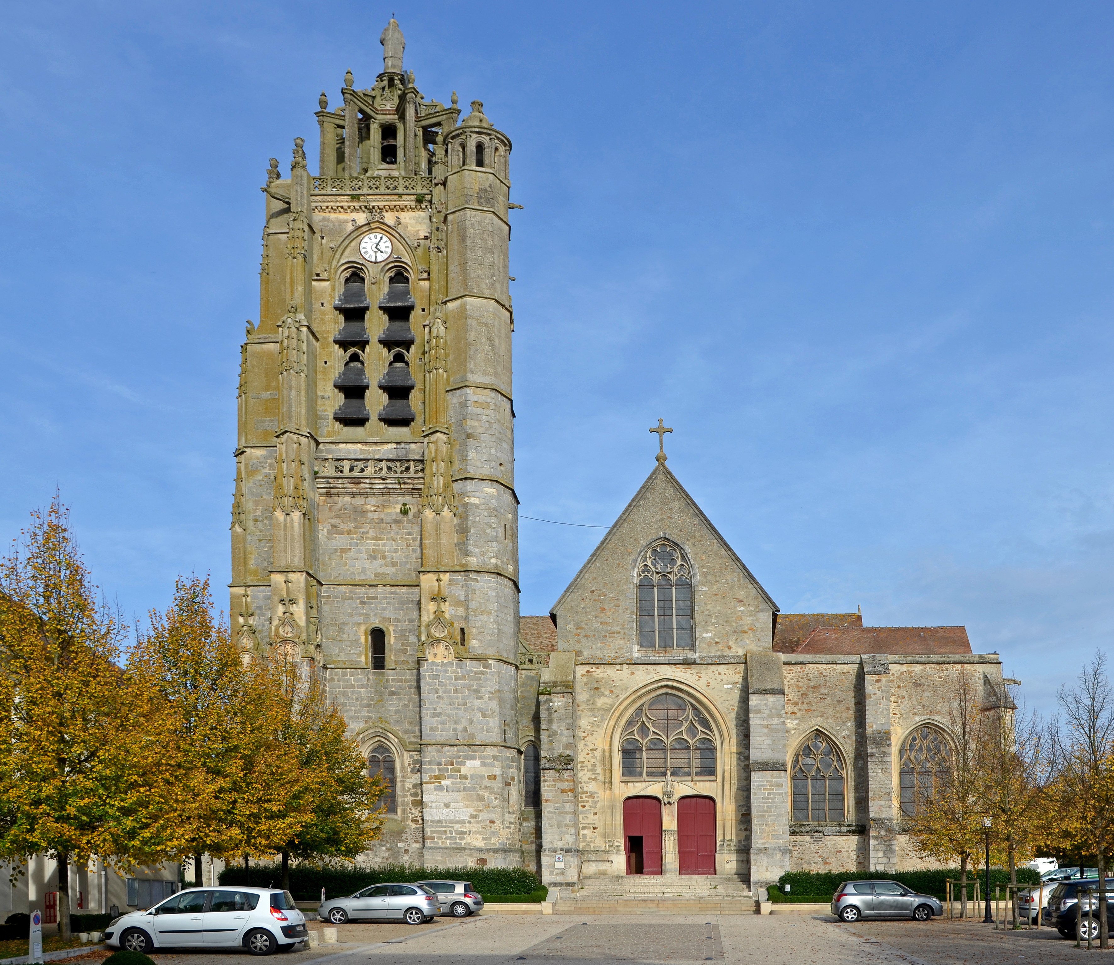 Eglise St-Laurent a Nogent-sur-Seine, Aube, Champagne Ardennes France